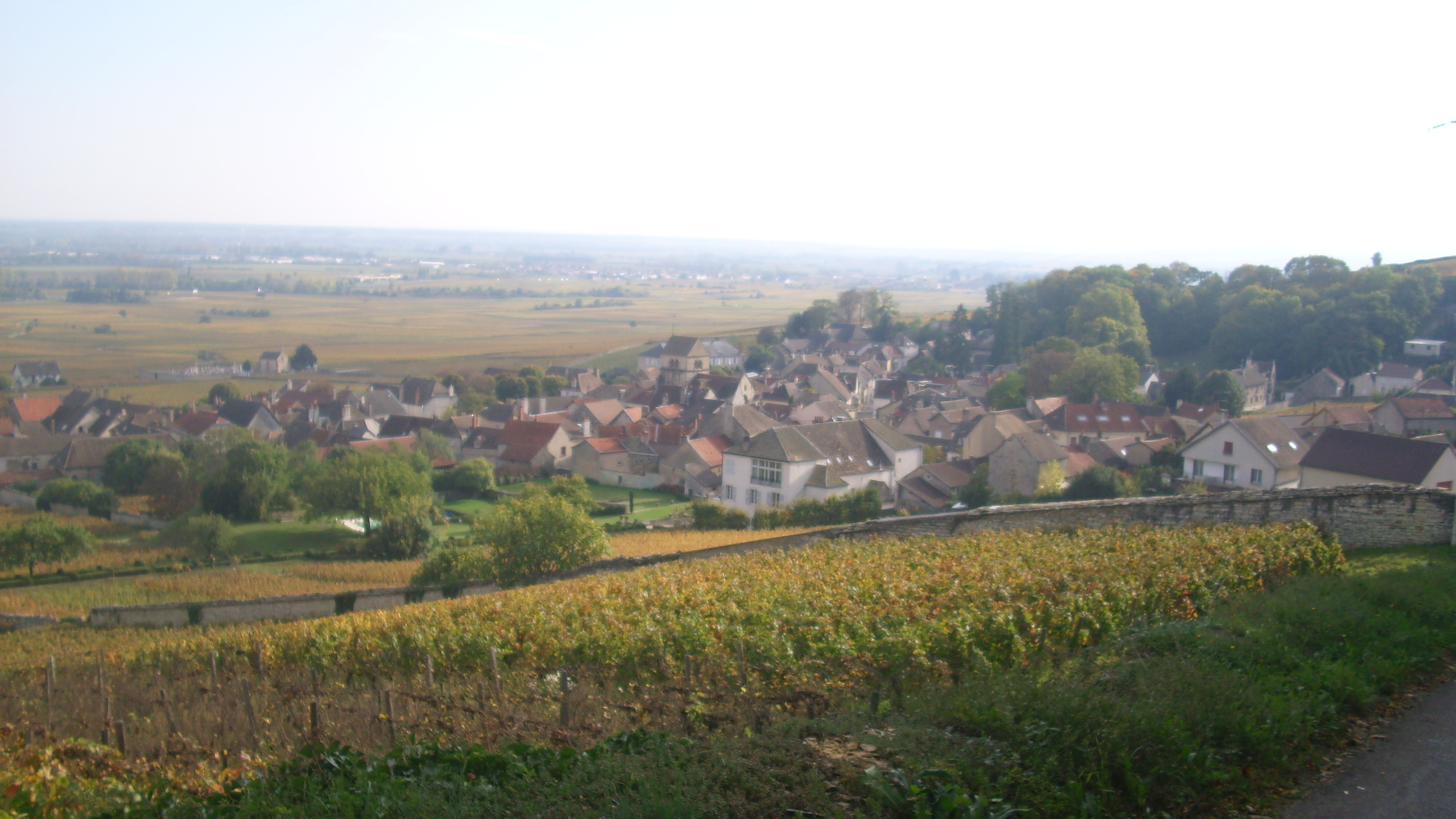 Vue du village de volnay et d'une petite partie de son vignoble